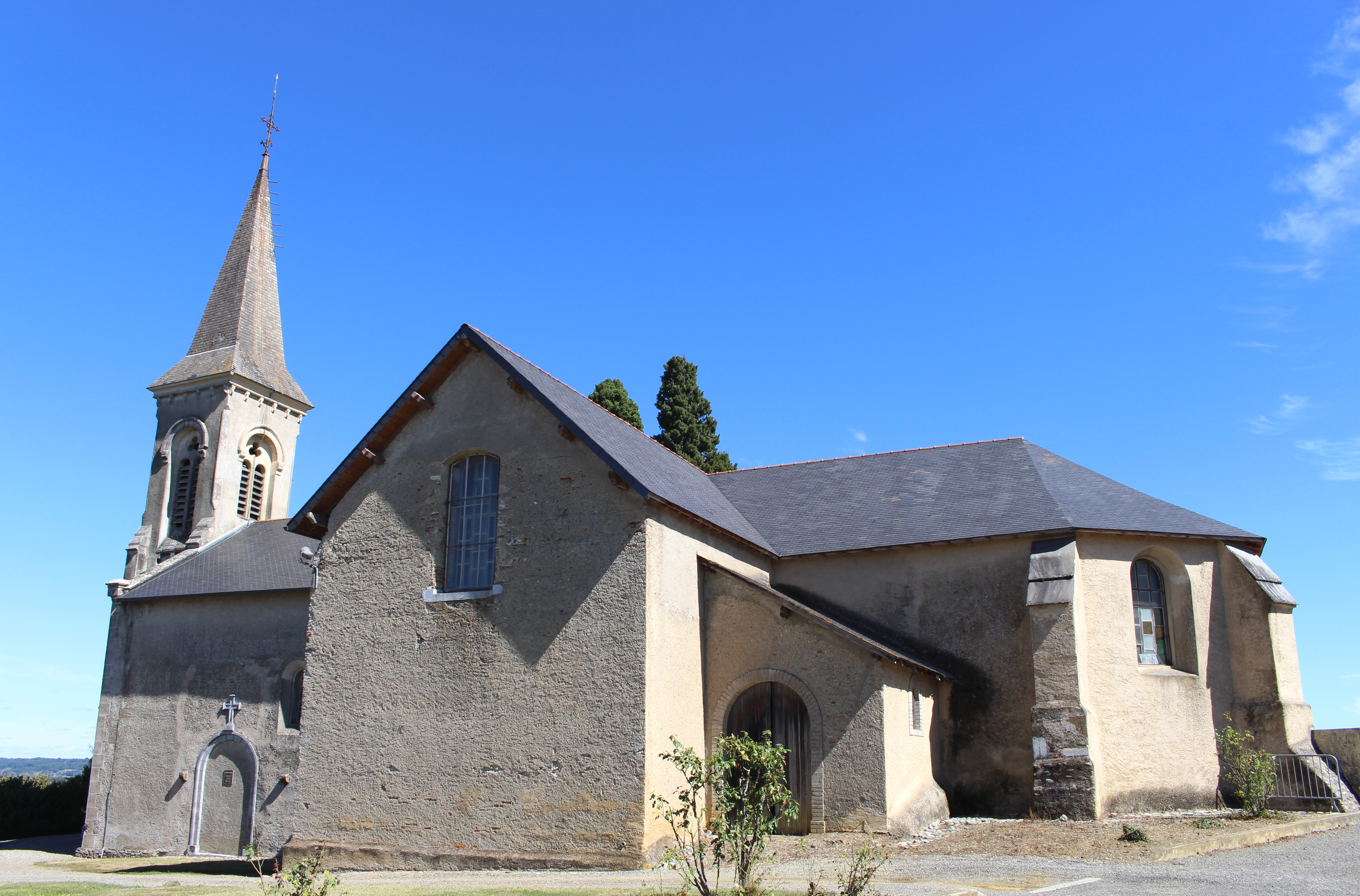 Église de l'Assomption de Lafitole (Hautes-Pyrénées)